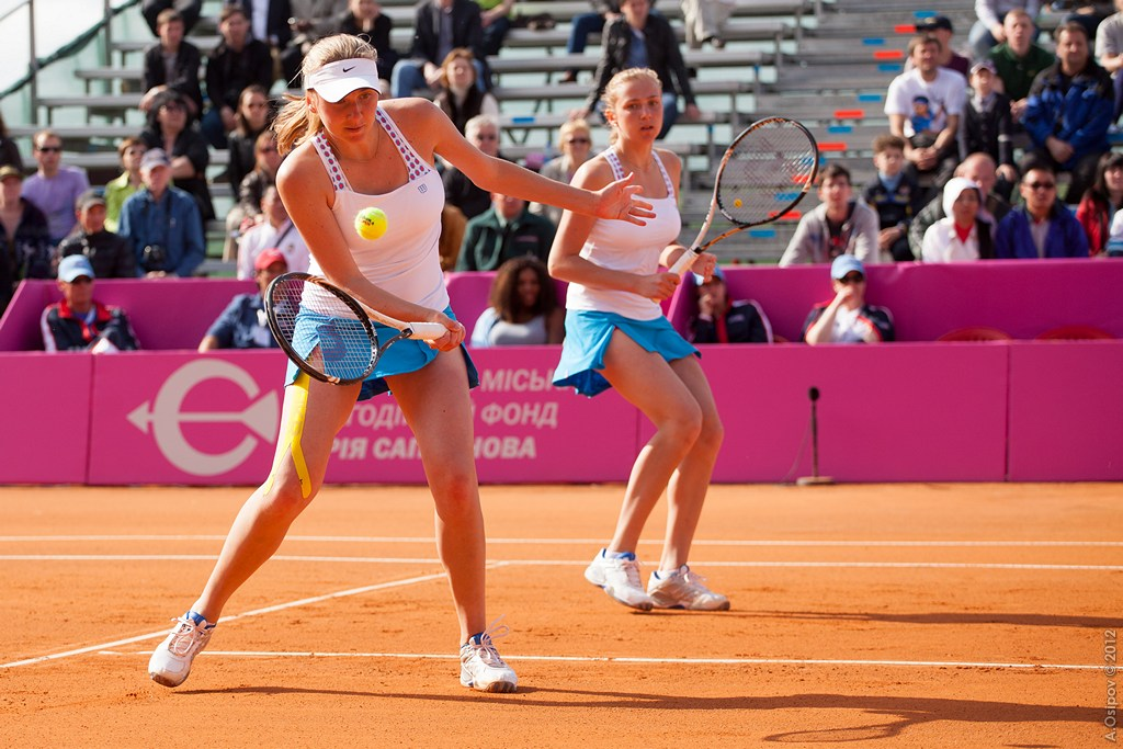 Lyudmyla Kichenok